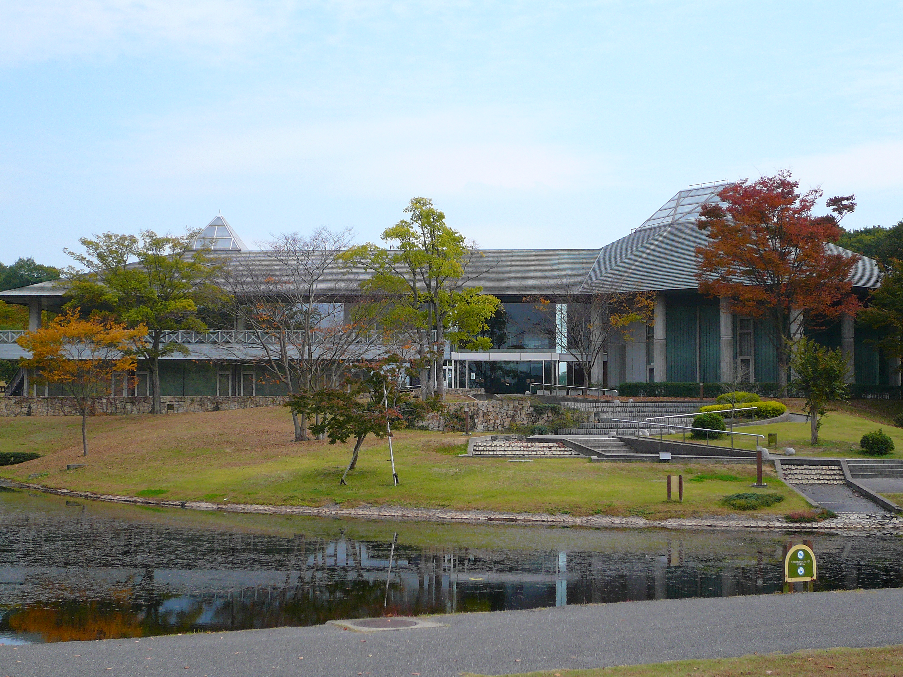 森の文化館